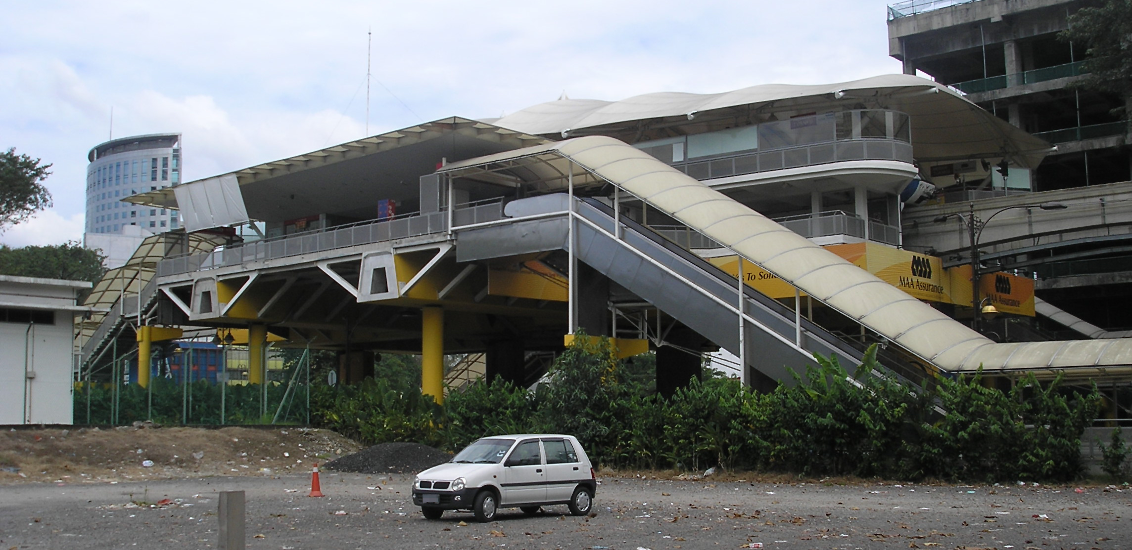 The Medan Tuanku station (Kuala Lumpur Monorail) (exterior), Kuala Lumpur.